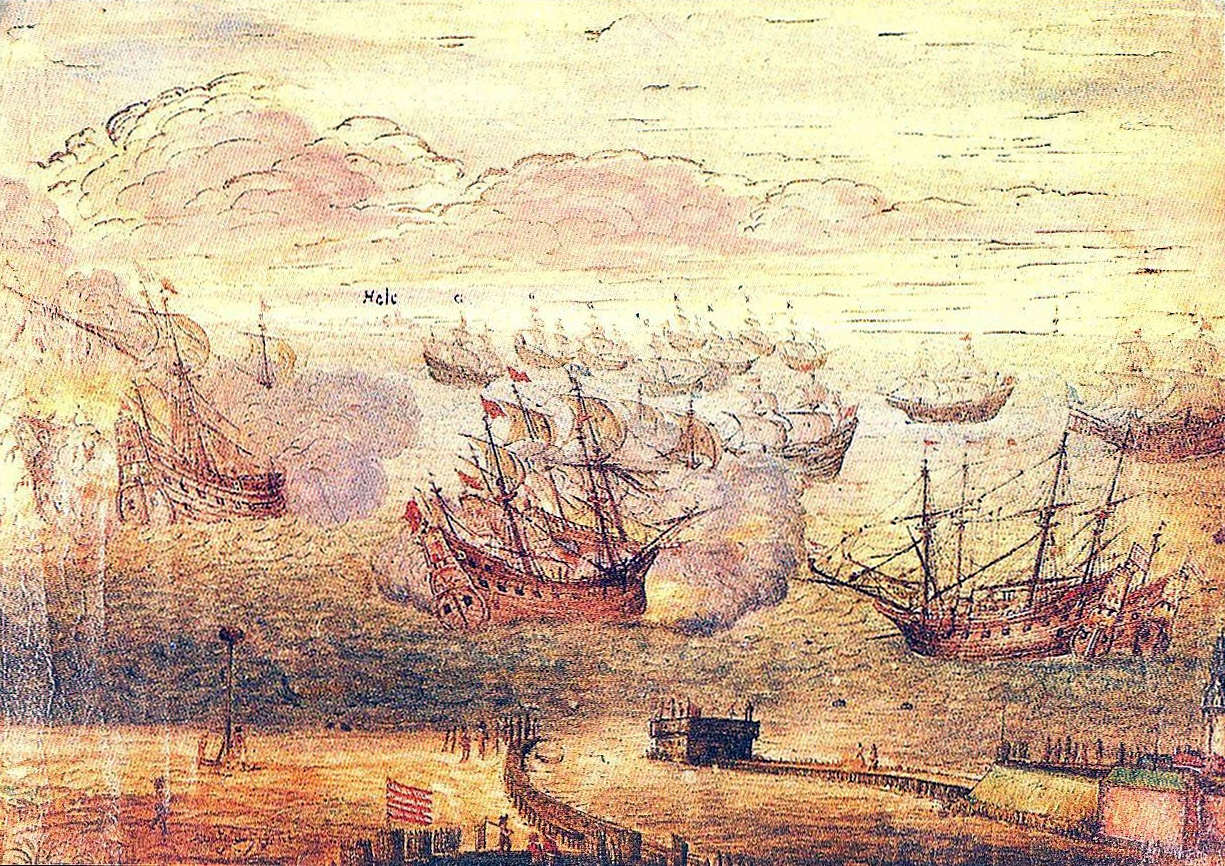 Aquarell der Seeschlacht vor Oliva 1627 von Adolf Boy